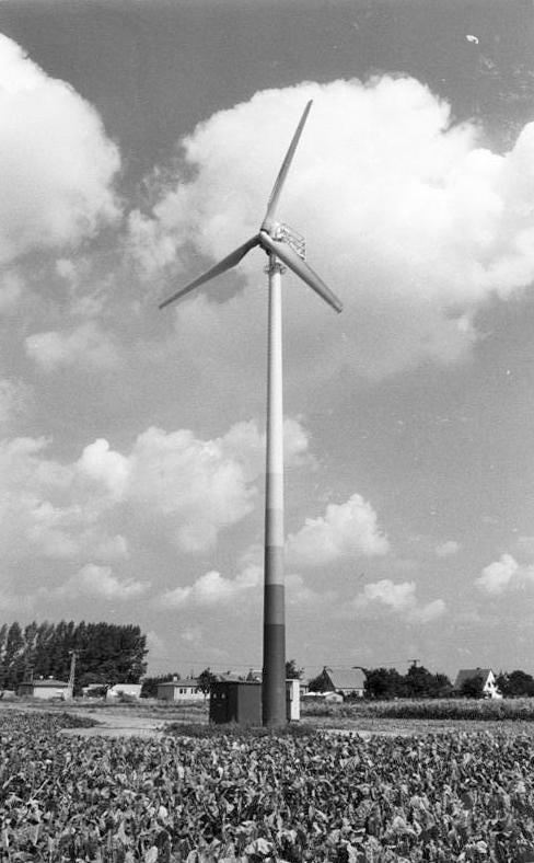 Krs. Merseburg, Windkraftanlagen ADN/Friedrich Gahlbeck/16.8.90 Bez. Halle: Alternativenergie Die erste Windkraftanlage Sachsen-Anhalts in Großgrafendorf (Kreis Merseburg) ist seit kurzem in Betrieb und speist 80 Kilowatt in das öffentliche Netz. Dem zweiten Apparat dieser Art in der DDR sollen weitere "kleinere Brüder von Boxberg" folgen. In der Gemeinde sind neben dem 30 Meter hohen Mast mit seinen 17 Meter großen Rotoren neun weitere Anlagen geplant, die jeweils 100 KW in das Energieverbundnetz der DDR eingeben sollen.